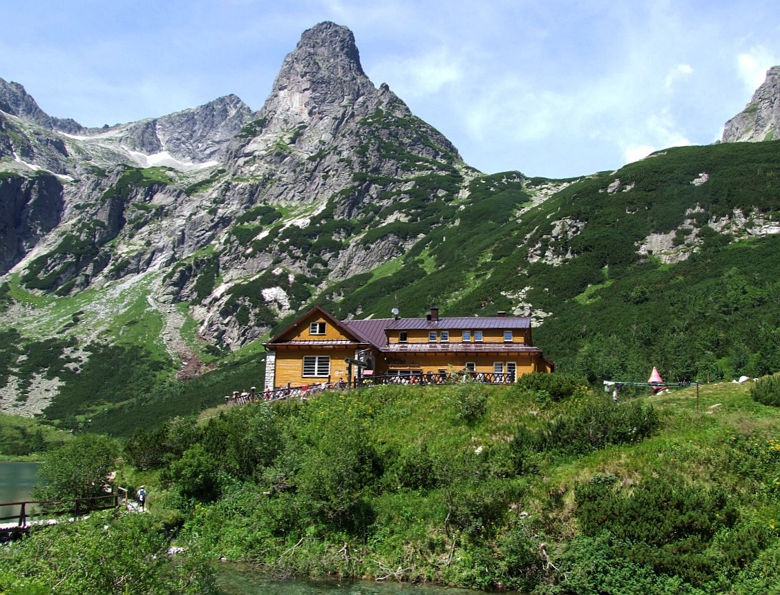 Zielona Dolina Kieżmarska (dolina Zeleného plesa)